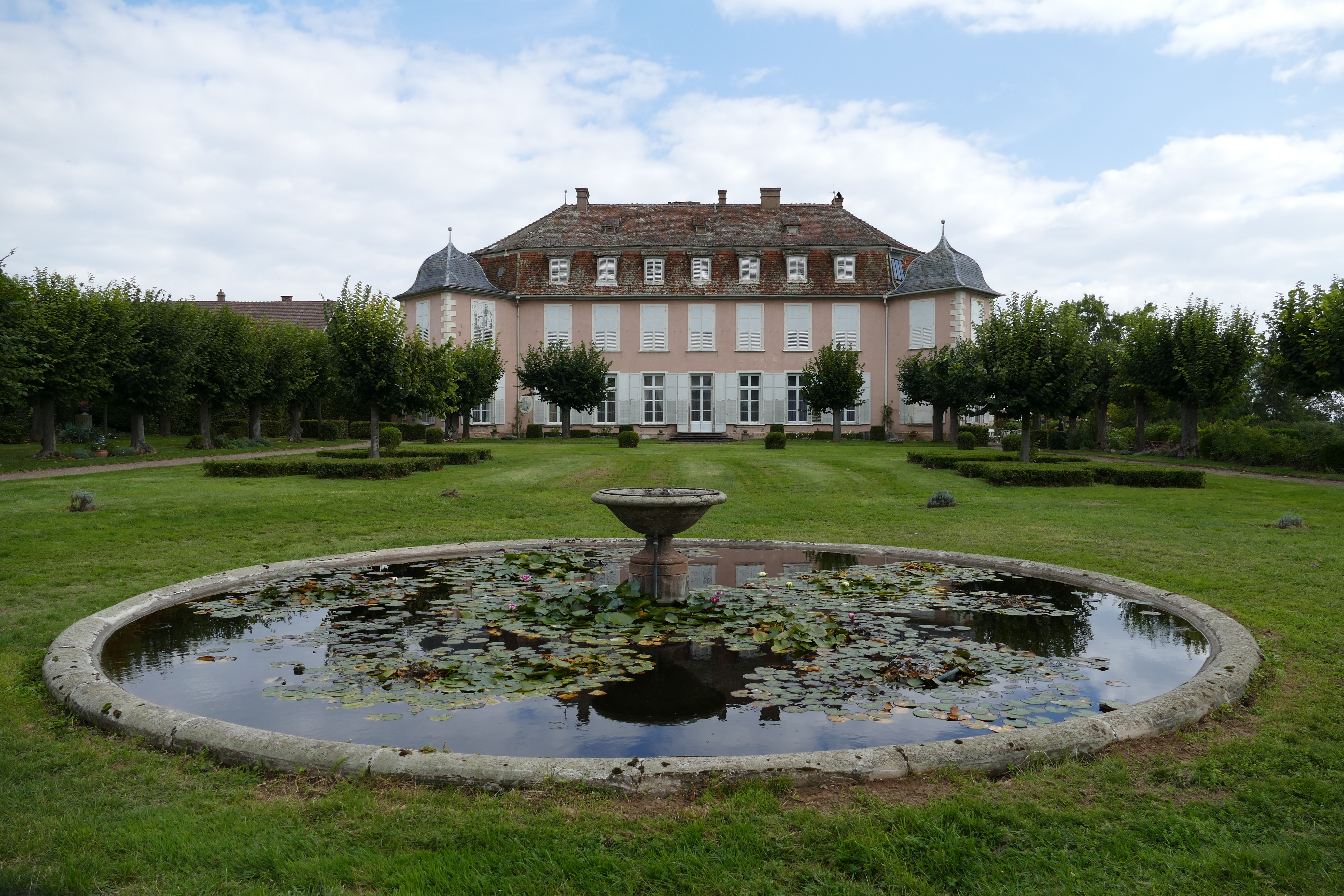 Alsace, Bas-Rhin, Château de Kolbsheim. La façade ouest vue de la terrasse supérieure des jardins. (PA00084762, IA00023184).